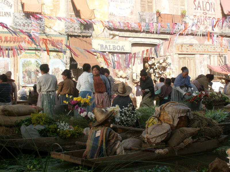 Recreacion del canal de Roldan para la película El Atentado